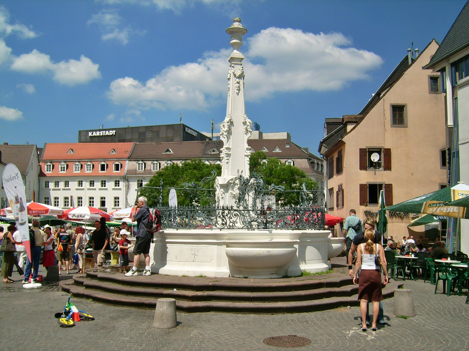 Stiefel links